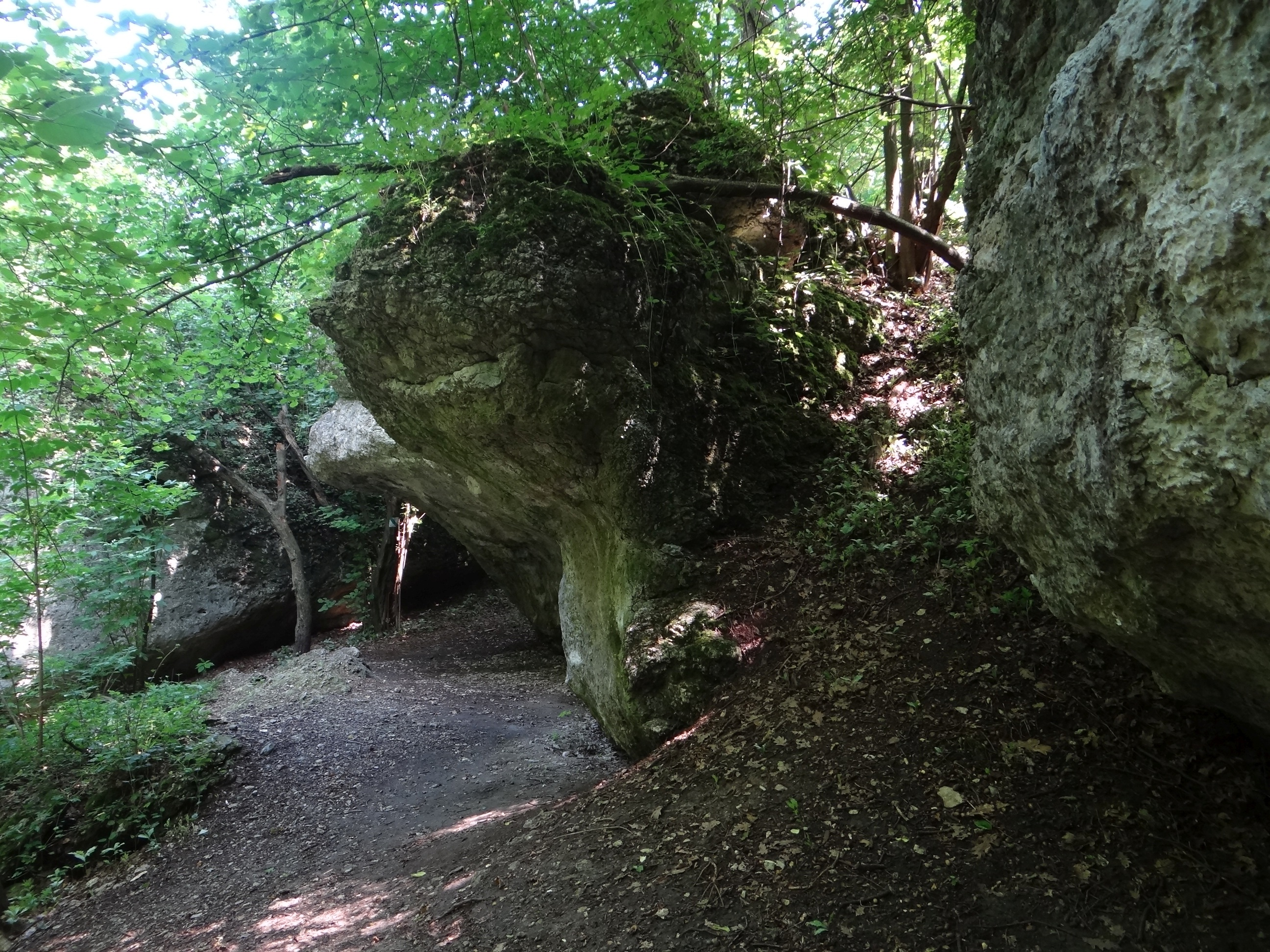 Nature reserve Zimny Dół